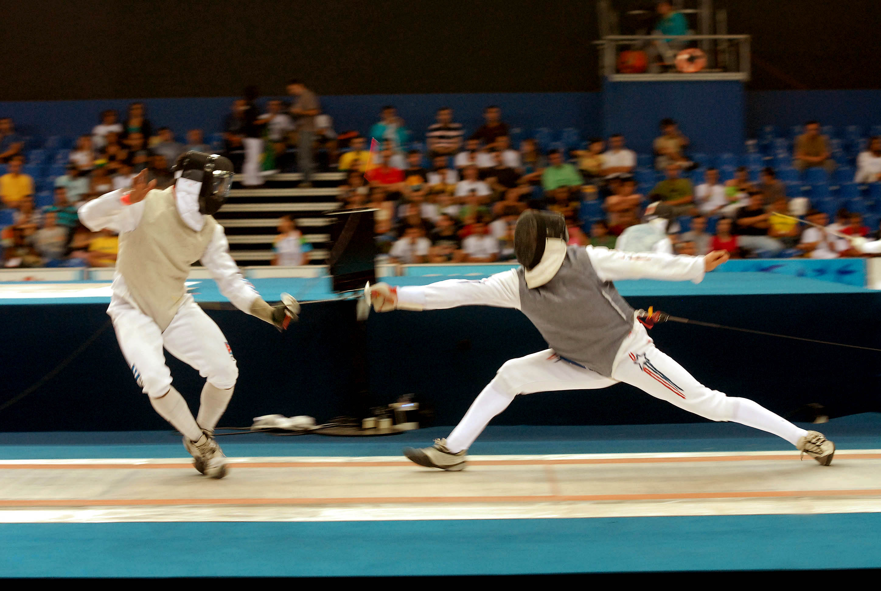 Competição de esgrima nos Jogos Pan-americanos, Rio de Janeiro.